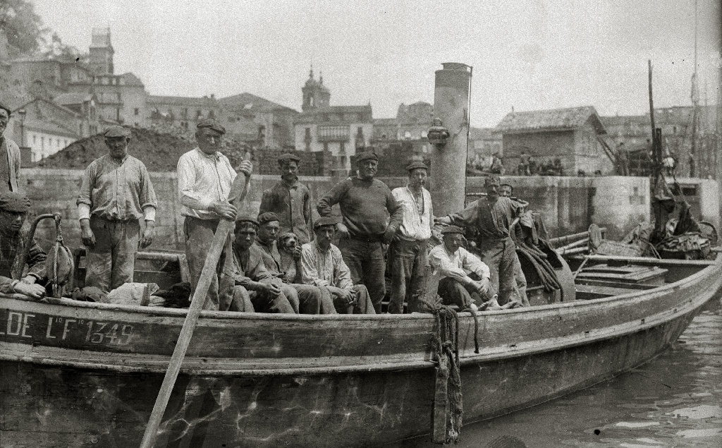 Título original: Arrantzales del vapor de pesca 'Clotilde' de Lekeitio en el puerto de San Sebastián. En el centro, el patrón y propietario Celestino Badiola (1/1) Localización: San Sebastián (Guipúzcoa)